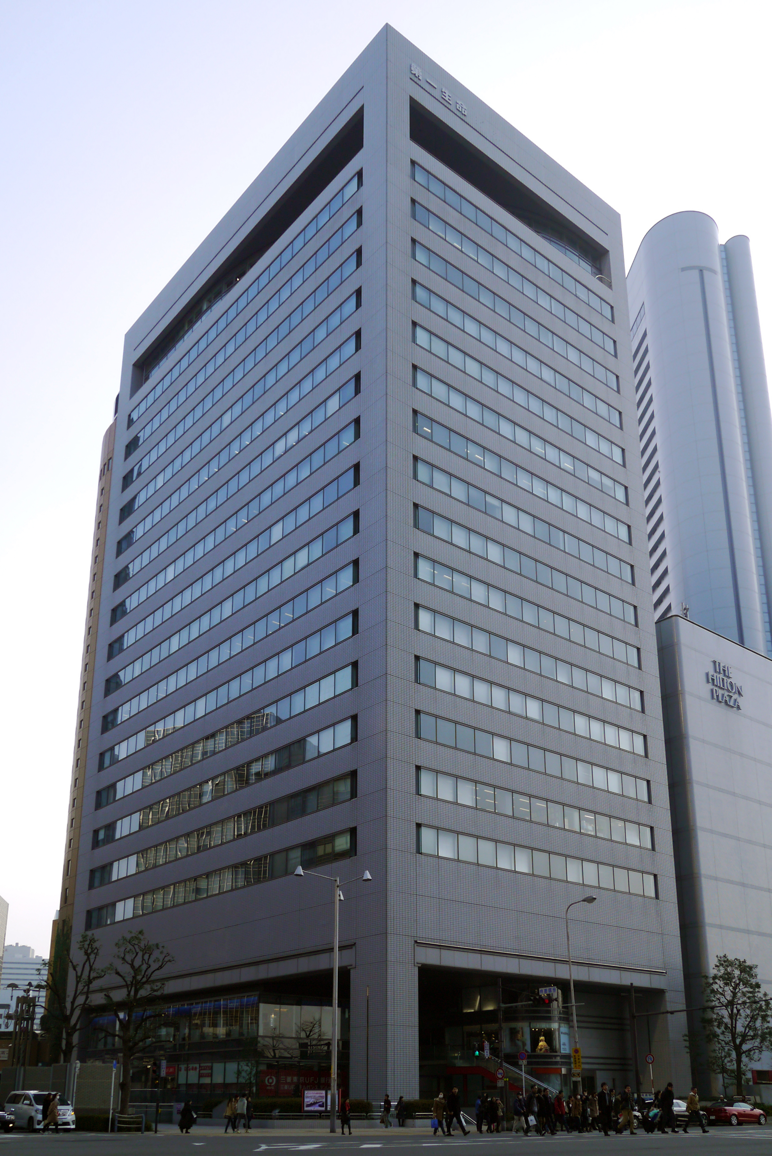 Osaka Daiichi Life Building (大阪第一生命ビル), Osaka, Osaka prefecture, Japan